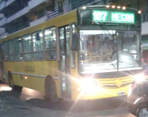 Mercedes-Benz de la línea 107 negra, operada por Rosario Bus